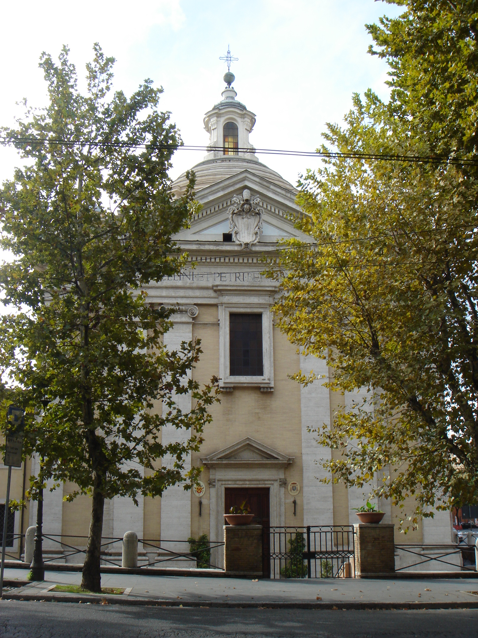 Roma,santi Marcellino e Pietro (rione Monti)